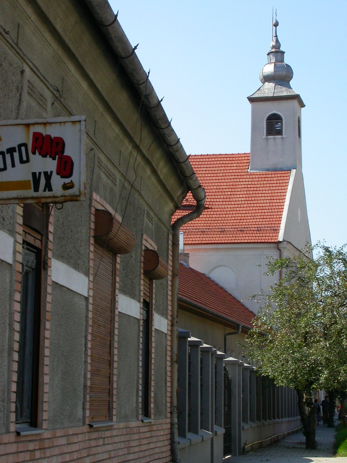 Biserica franciscană, sec. XVIII 01